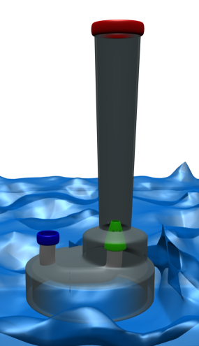 Hydro-éjecteur pompier en3D.png